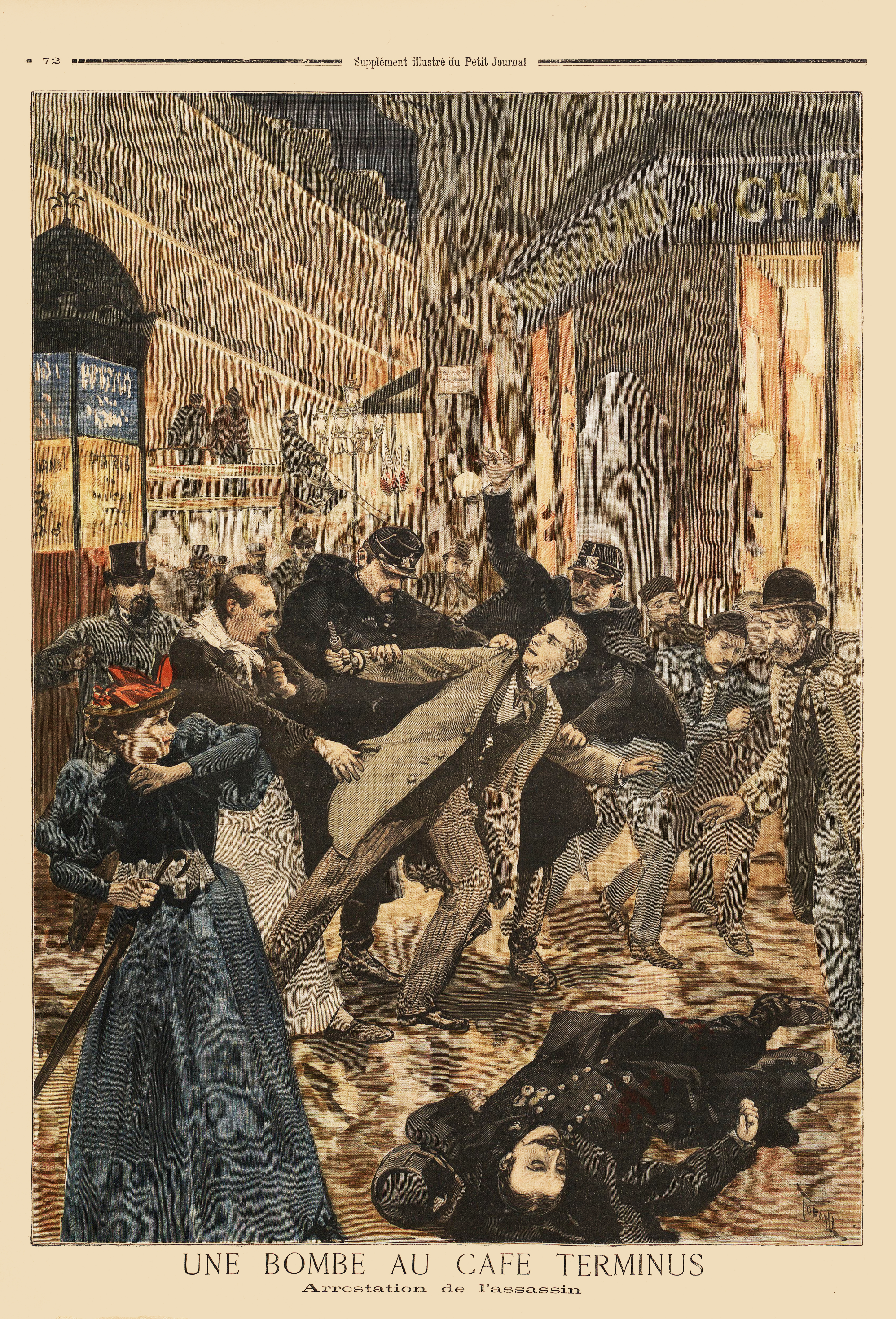 Attentat de l'hôtel Terminus, Le Petit Journal Illustré, 26 Février 1894.